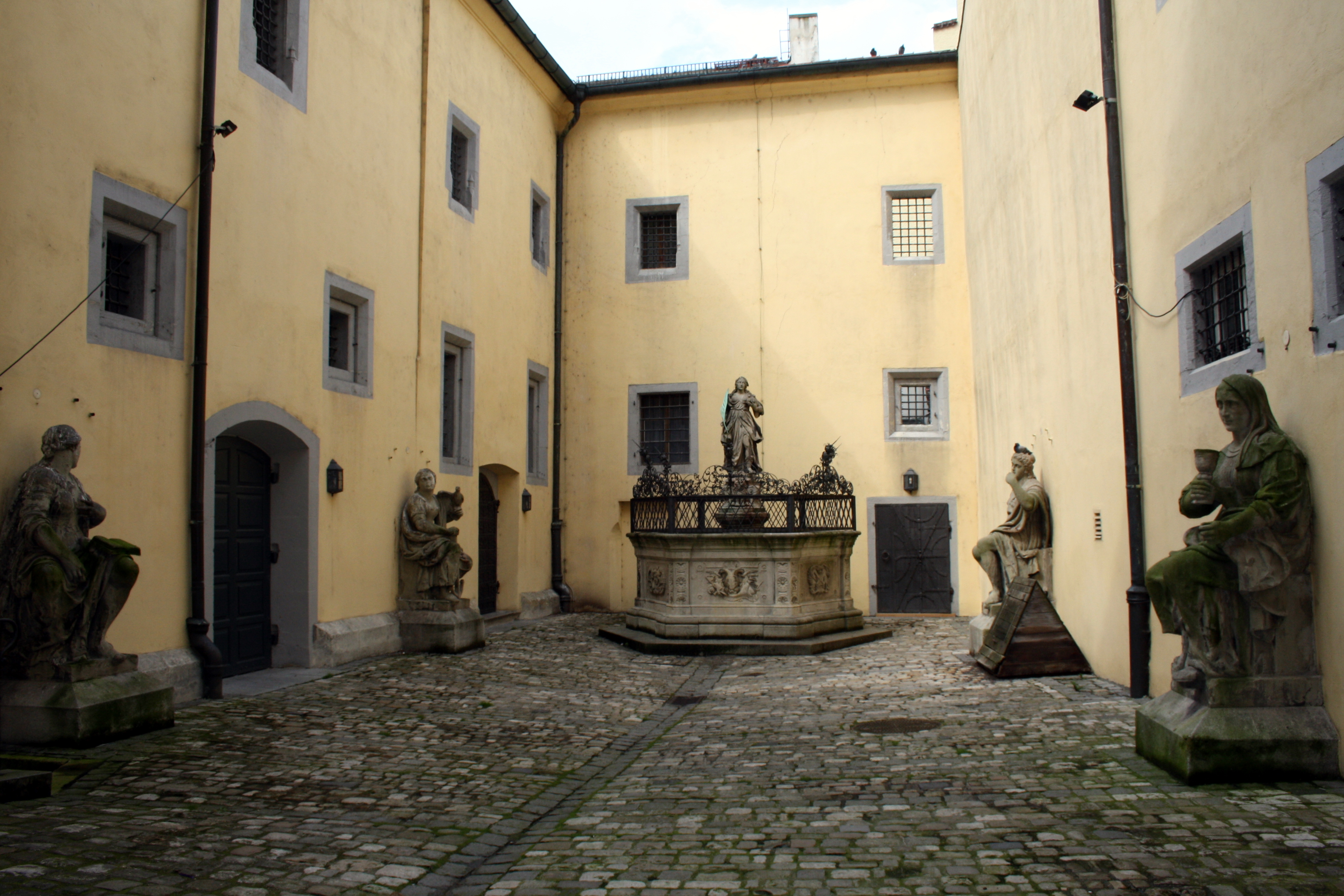 Großer Rathaushof (Justitia-Hof) Regensburg